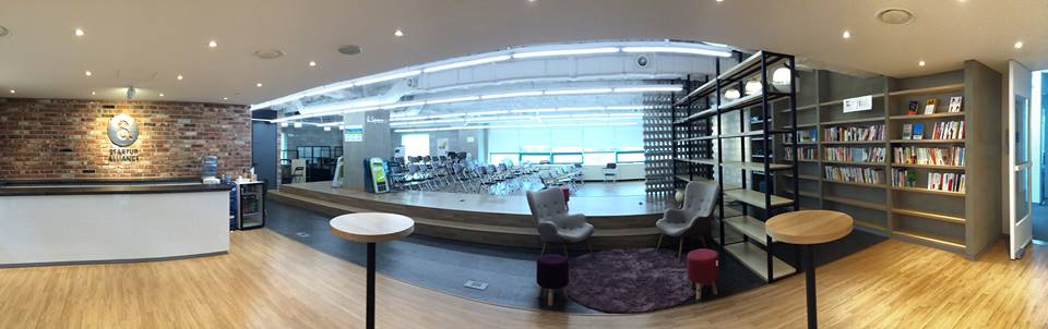 앤스페이스, 스타트업 공동 업무 및 이벤트 공간